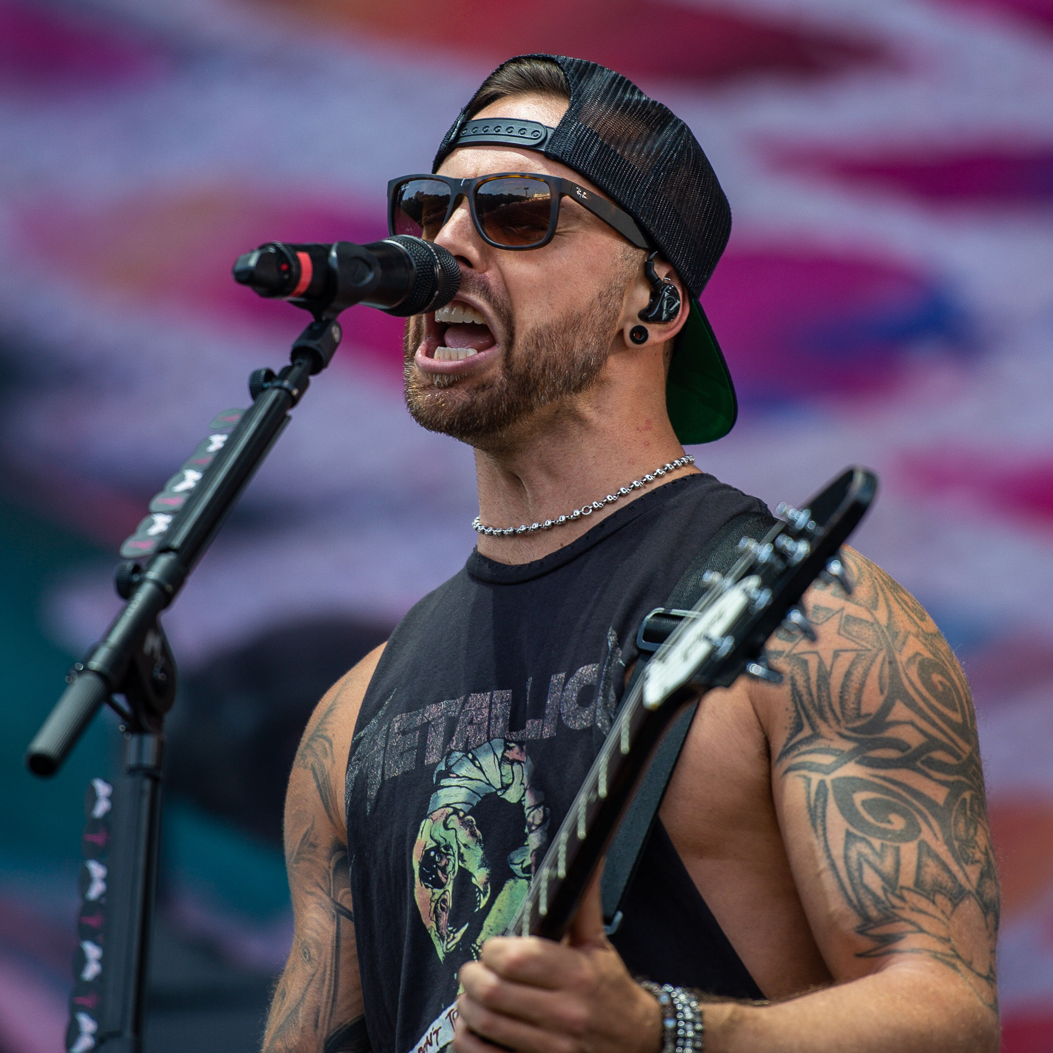 ARGO-Konzerte,Beck's Park Stage,Bullet for My Valentine,Festival,Konzert,Livekonzert,Livemusik,Matthew Tuck,Musik,RiP,Rock im Park 2018